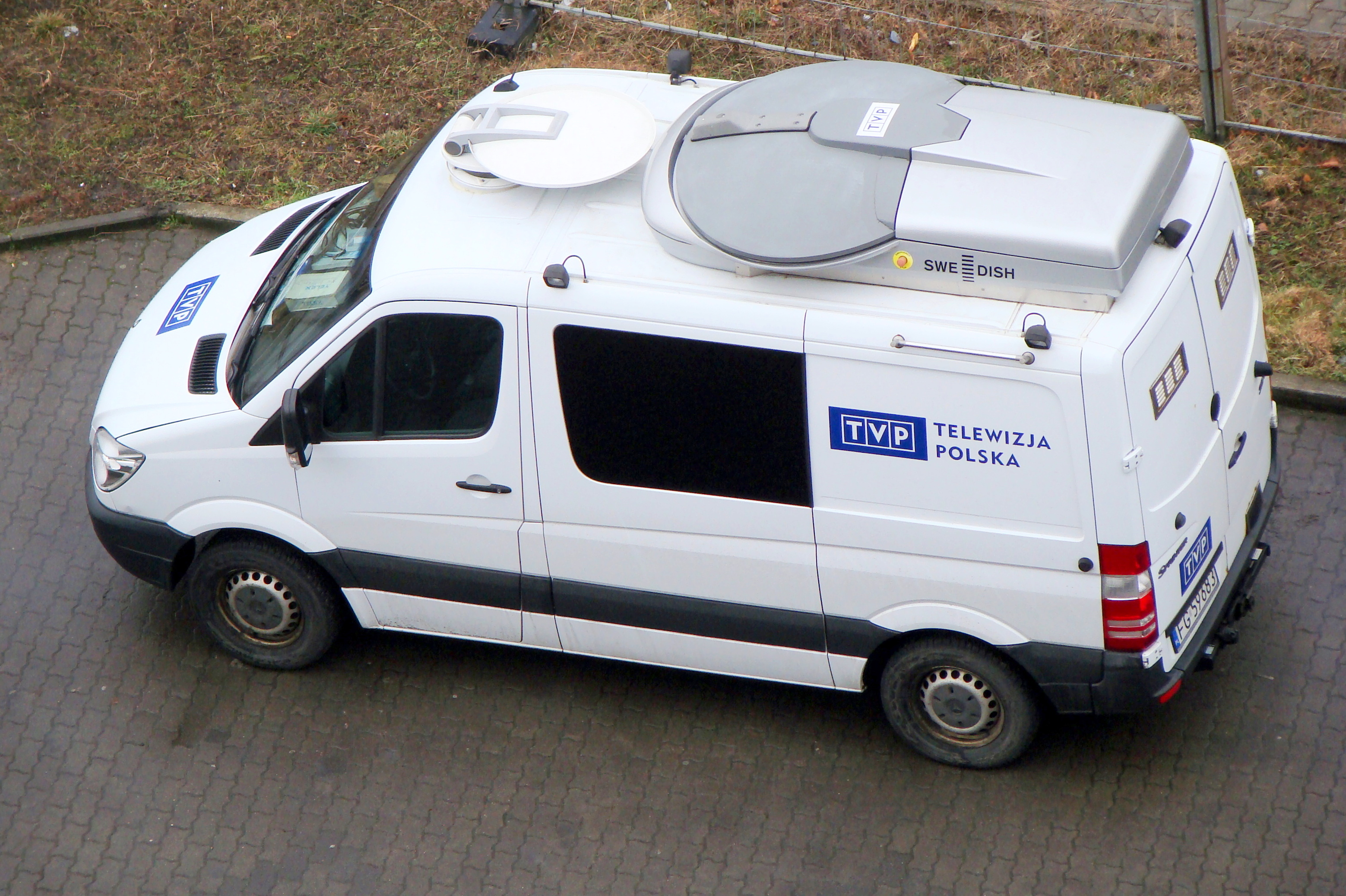 Wóz transmisyjny DSNG oddziału terenowego TVP w Gorzowie Wlkp. (TVP 3 Gorzów Wlkp.)